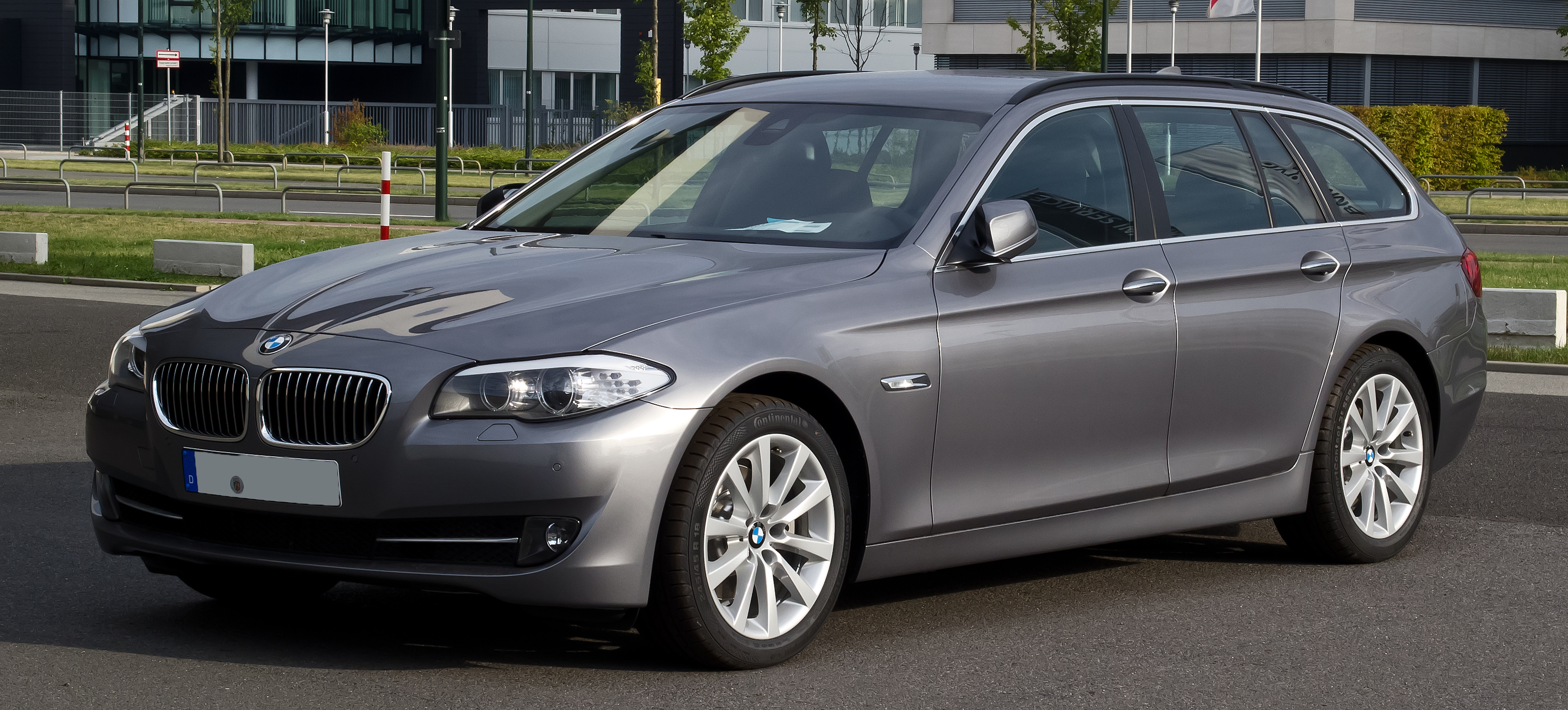 BMW 5er Touring (F11)